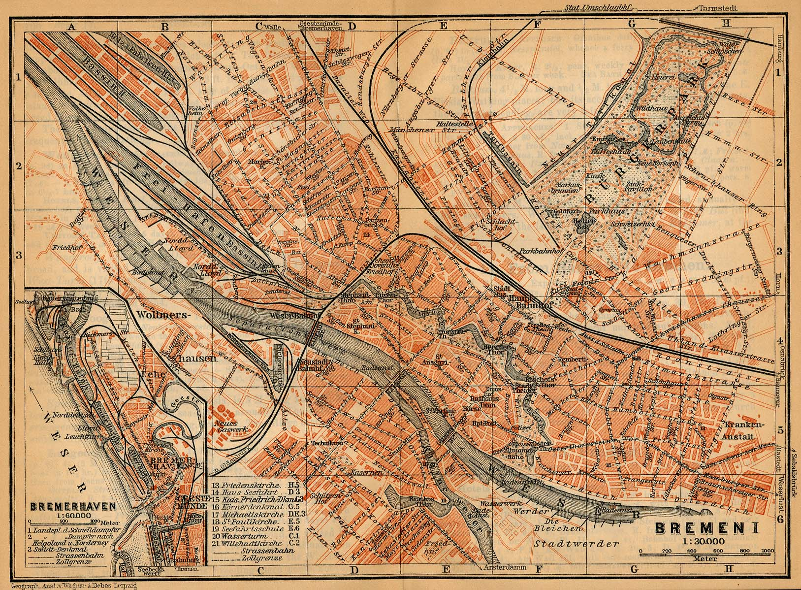 Mapa německého města Bremen v roce 1910